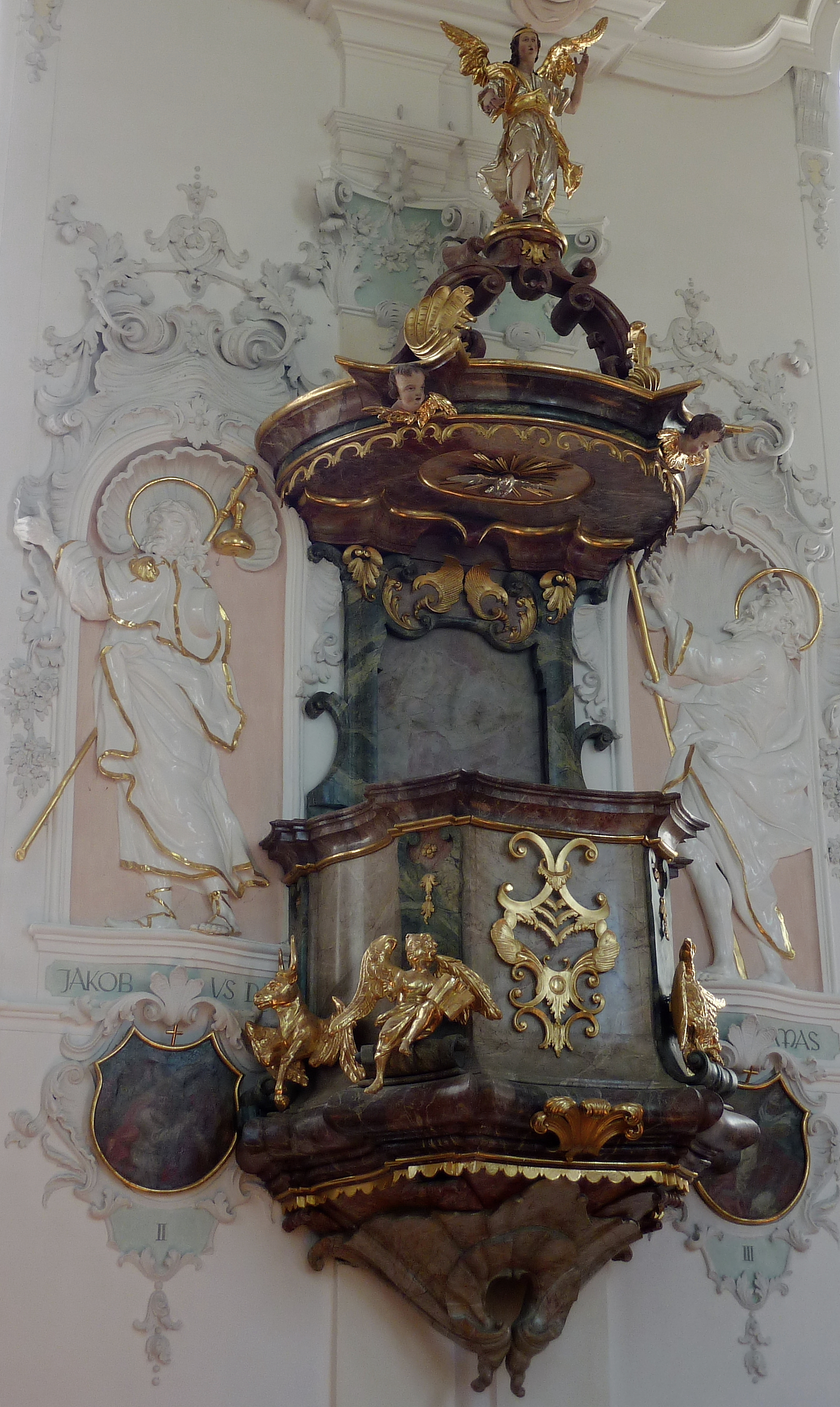 Katholische Pfarrkirche St. Georg in Westendorf, einer Gemeinde im Landkreis Augsburg (Bayern), Kanzel (um 1741) von Johann Michael Bertele, Schnitzfiguren werden Johann Michael Fischer zugeschrieben